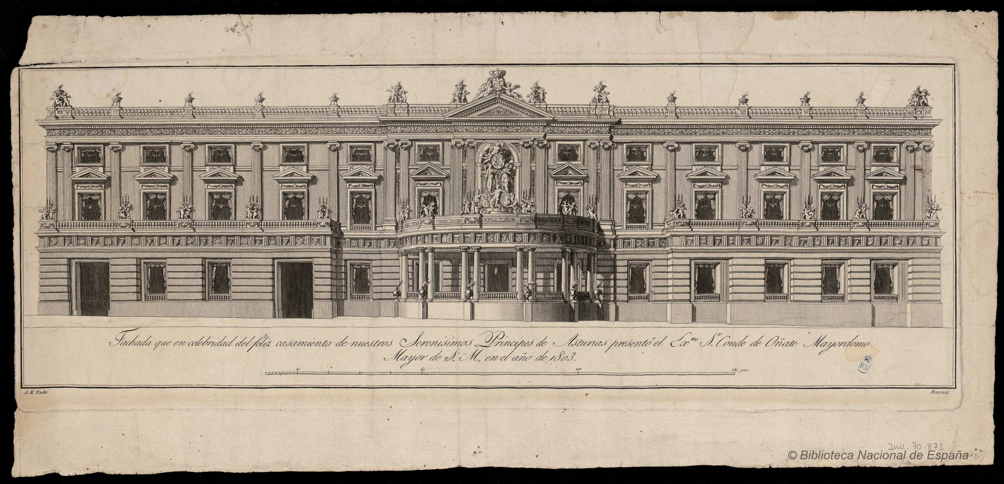 Adorno de la fachada de la casa de los condes de Oñate. Inscripción: "Fachada que en celebridad del feliz casamiento de nuestro Serenisimos Principes de Asturias presentó el Exmo. S.r Conde de Oñate Mayordomo Mayor de S. M. en el año de 1803". Aguafuerte. Biblioteca Nacional de España